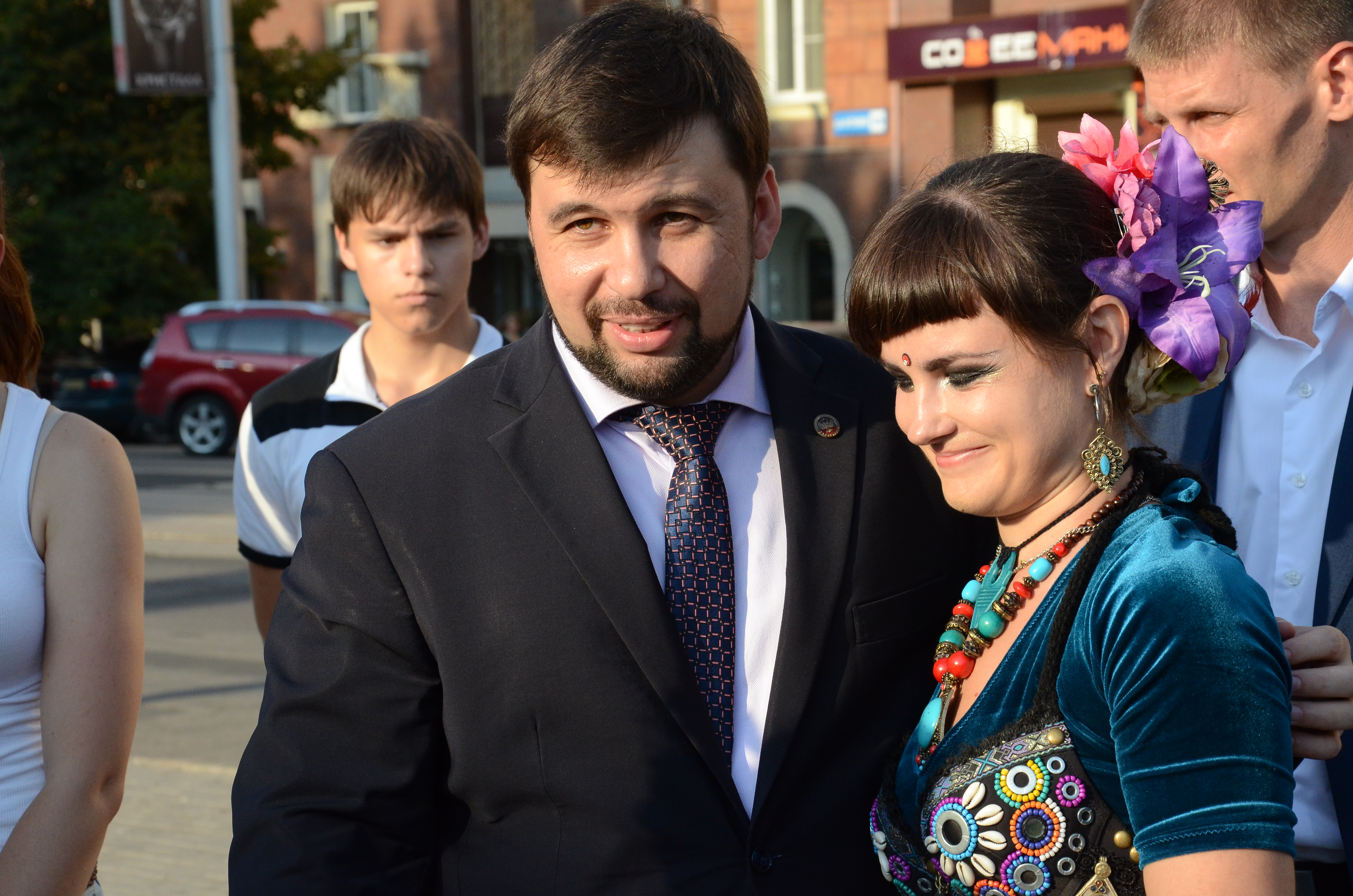 Фестиваль «Большой Донбасс»